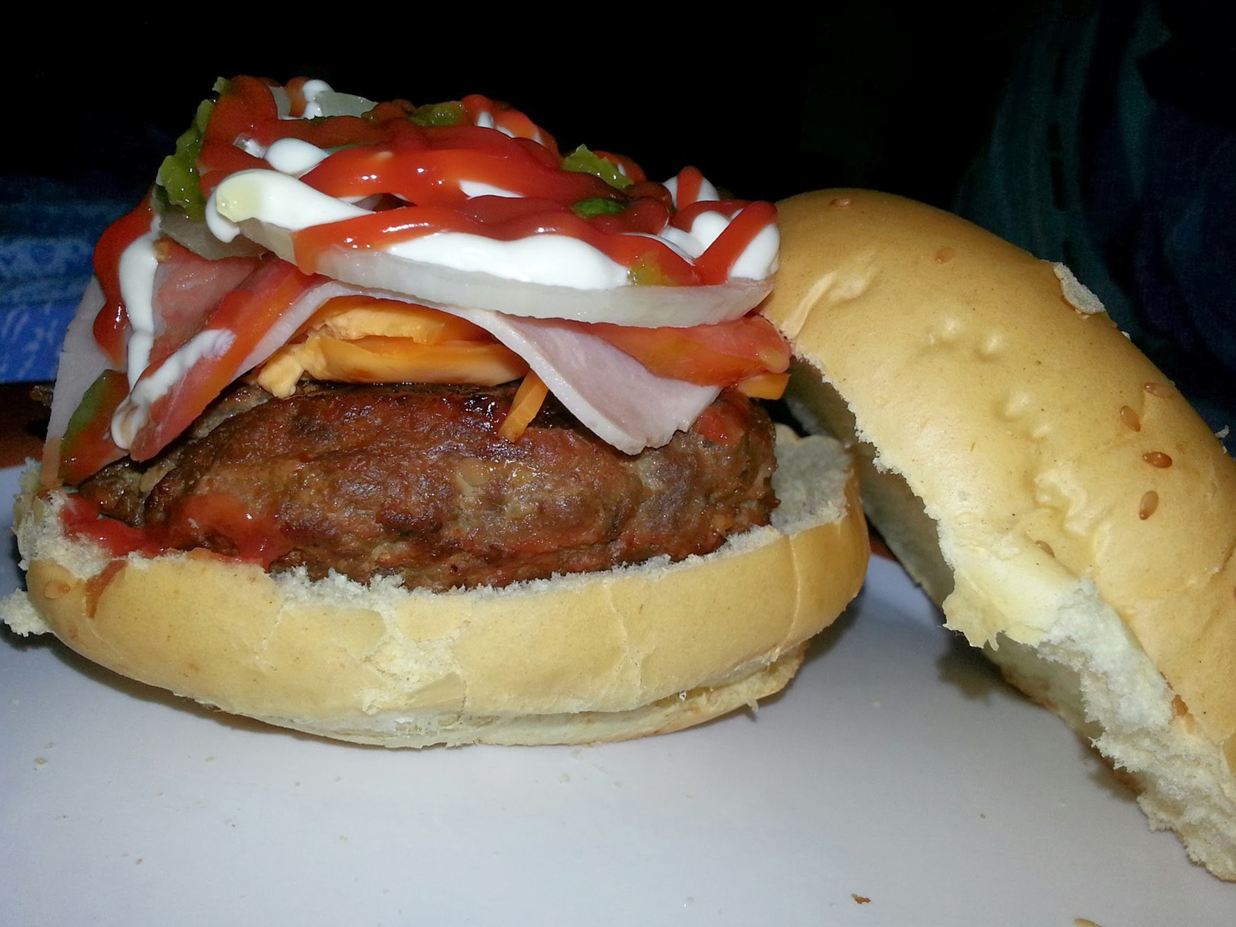 500px provided description: Super Burguer [#tomato ,#tomate ,#onion ,#homemade ,#bacon ,#burguer ,#ham ,#sauce ,#chesse ,#cebolla ,#hambuerguesa ,#hechoencasa ,#tocineta ,#pepinillos ,#jalape?os]